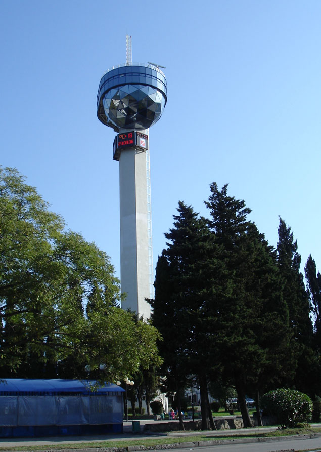 Башня диспетчерского пункта порта Туапсе. Собственное фото Липунова Геннадия, 09.2006.